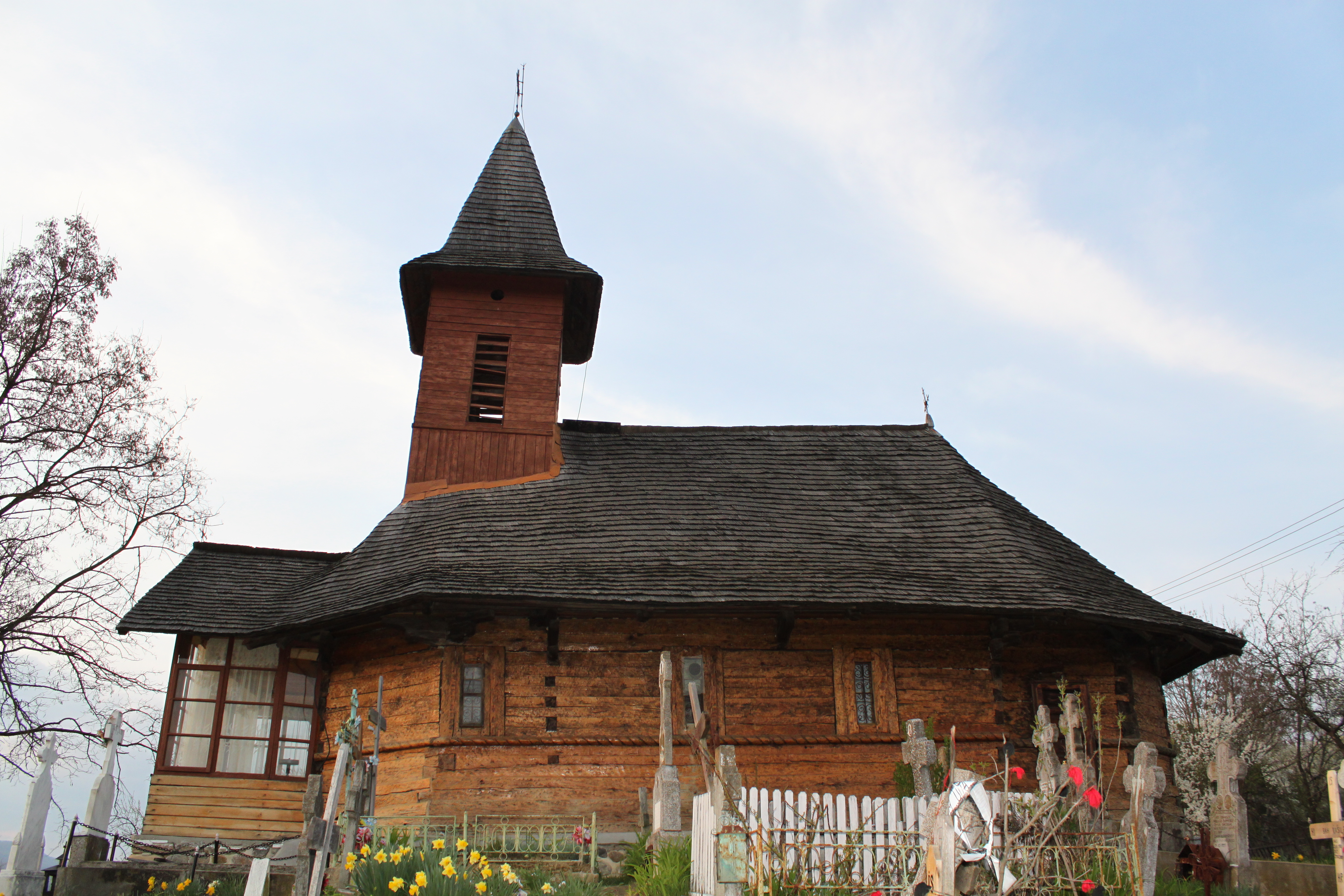 Biserica de lemn din Valea Faurului, judeţul Argeş.